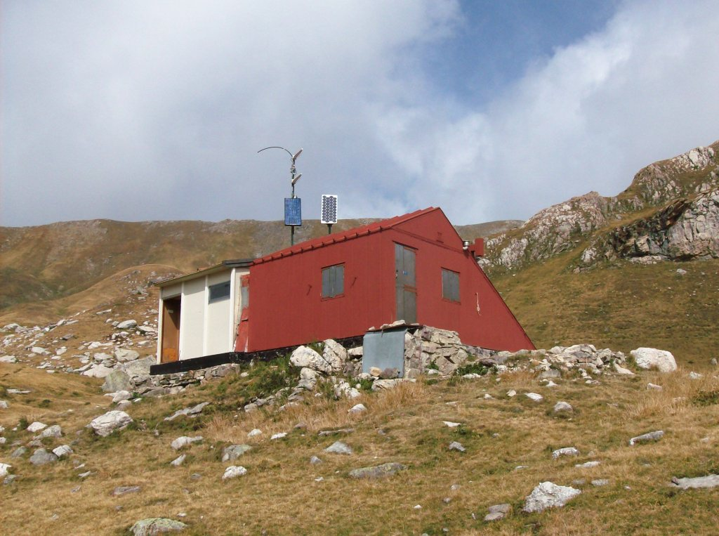 Capanna Scientifica Saracco Volante - Conca di Piaggiabella, Marguareis (Briga Alta, CN)